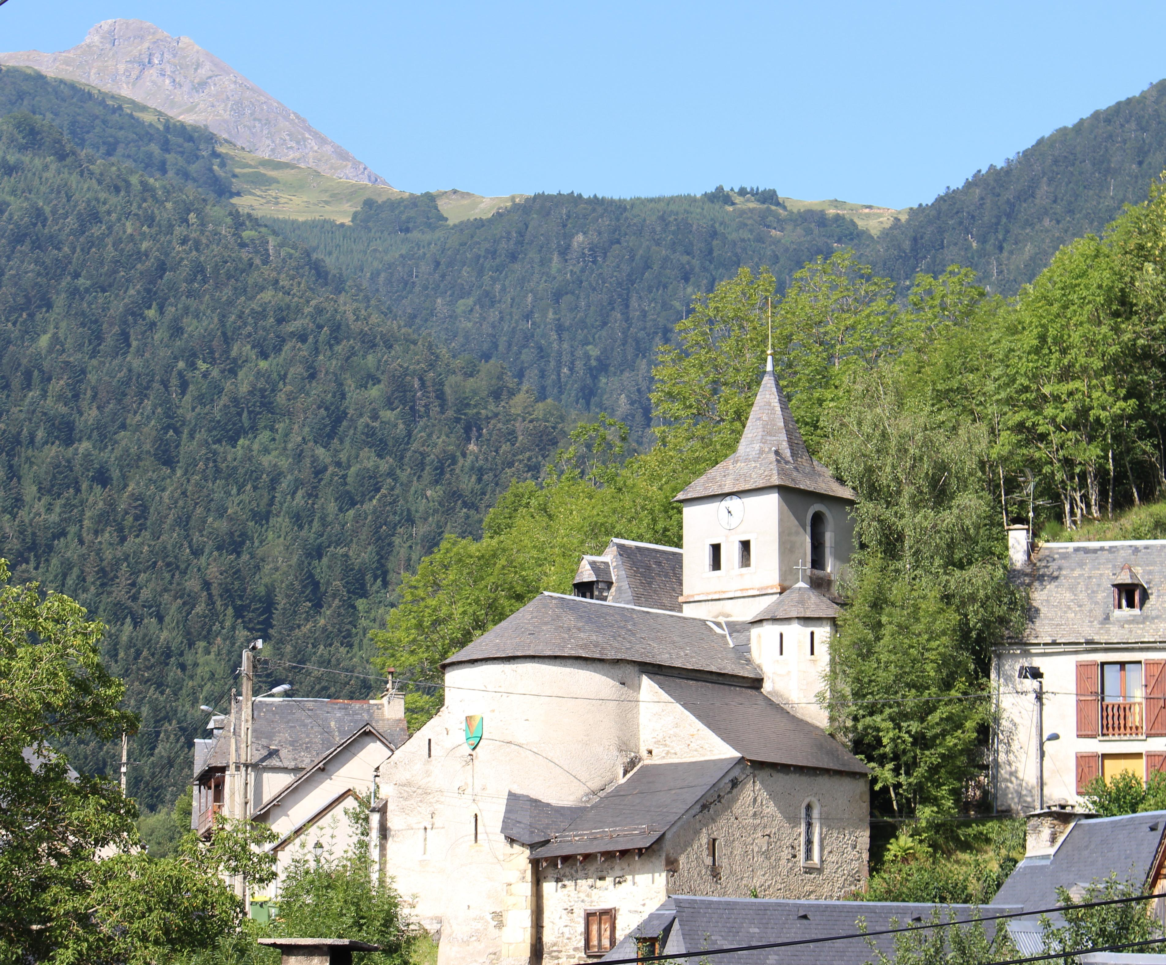 Église Saint-Martin de Barrancoueu (Hautes-Pyrénées)